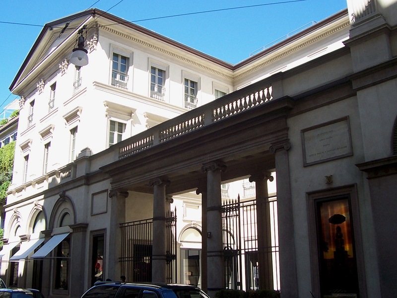 Milano - Via Montenapoleone